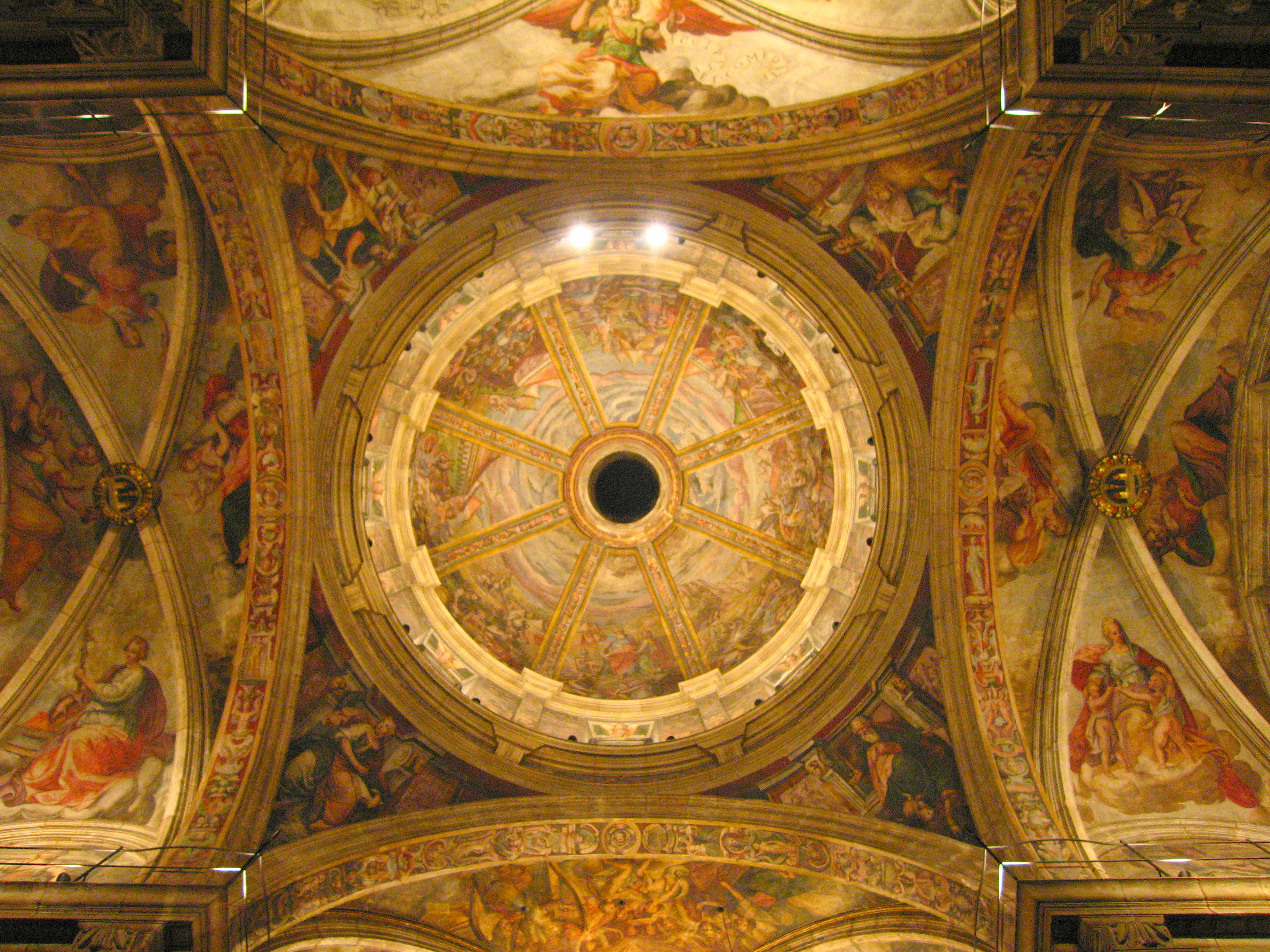 Cúpula Església Patriarca València